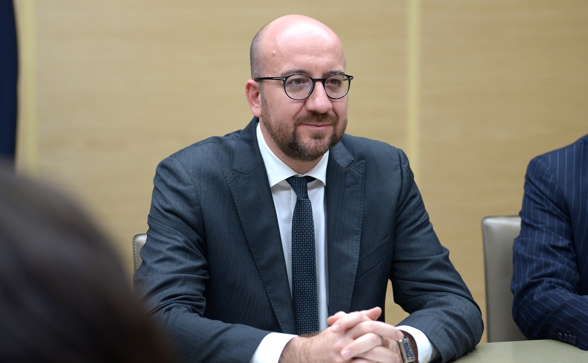 Премьер-министр Бельгии Шарль Мишель во время встречи с Президентом России Владимиром Путиным